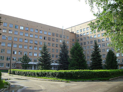 Тверская областная клиническая больница